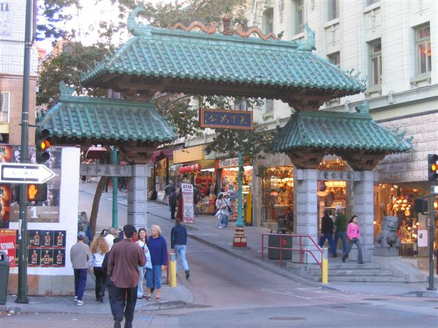 Порталът на Китайския квартал в Сан Франциско, щата Калифорния, САЩ. (авторска снимка)